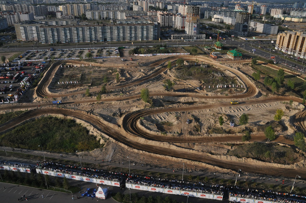 Скоростной участок в Казани был проложен в центре города специально для участников марафона.